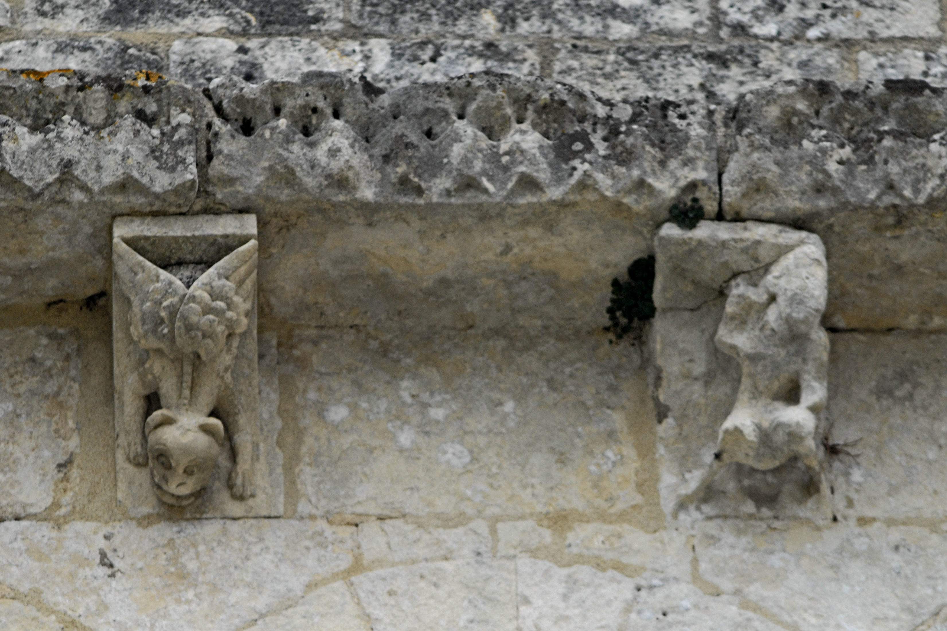 Notre-Dame Corme-Écluse,Kragsteine Nr, 3+4